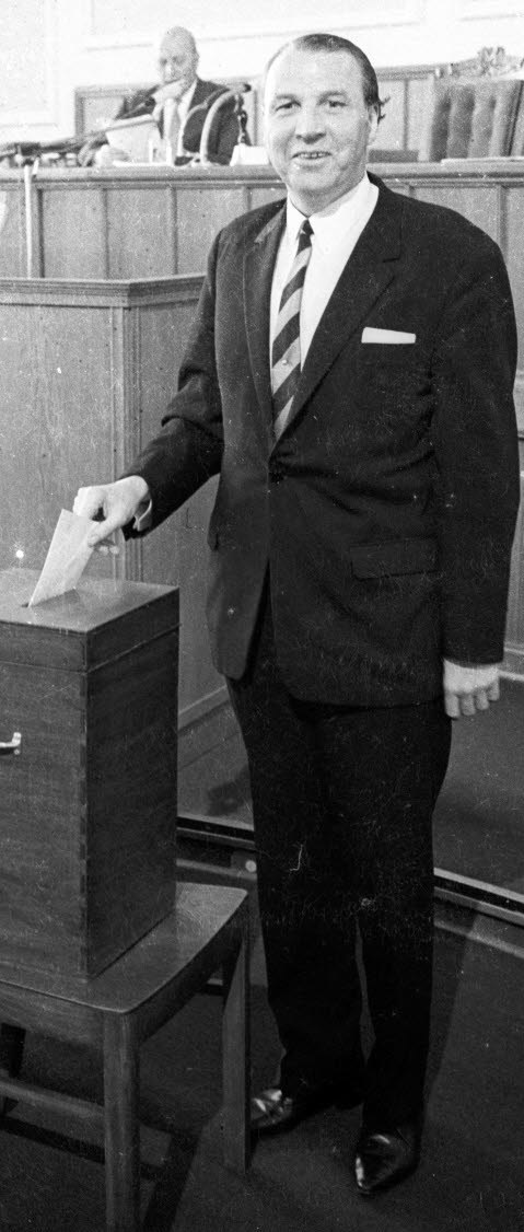 Paul Rohloff bei der Stimmabgabe.